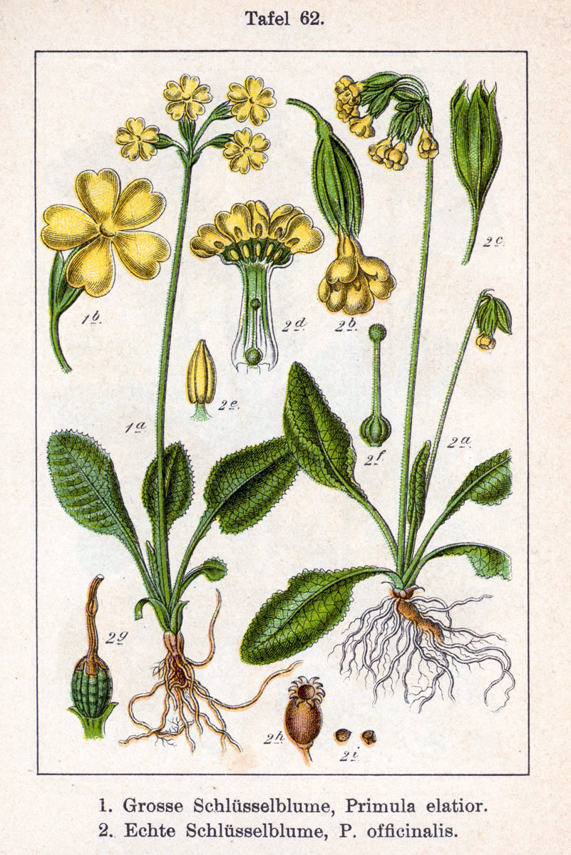 1. Primula elatior (L.) Hill 2. Primula veris L., syn. Primula officinalis (L.) Hill Original Description 1. Grosse Schlüsselblume, Primula elatior 2. Echte Schlüsselblume, Primula officinalis